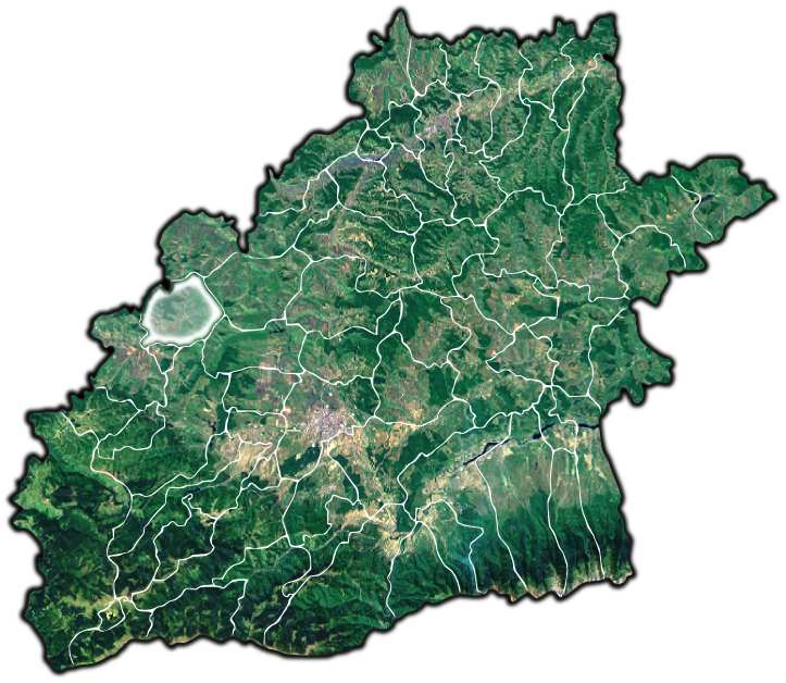 Ludos jud Sibiu